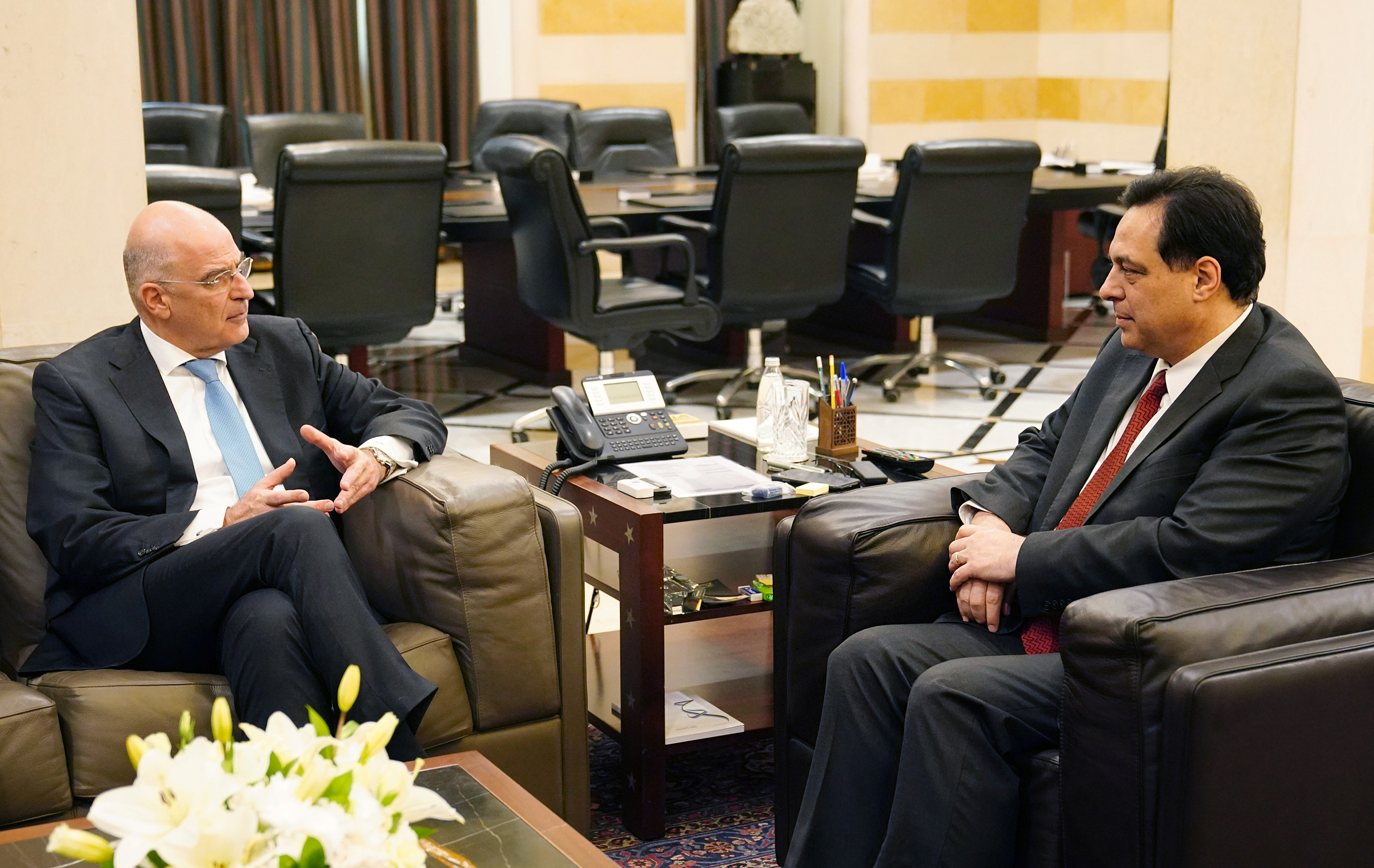 Συνάντηση ΥΠΕΞ Ν. Δένδια με τον Π/Θ του Λιβάνου H. Diab